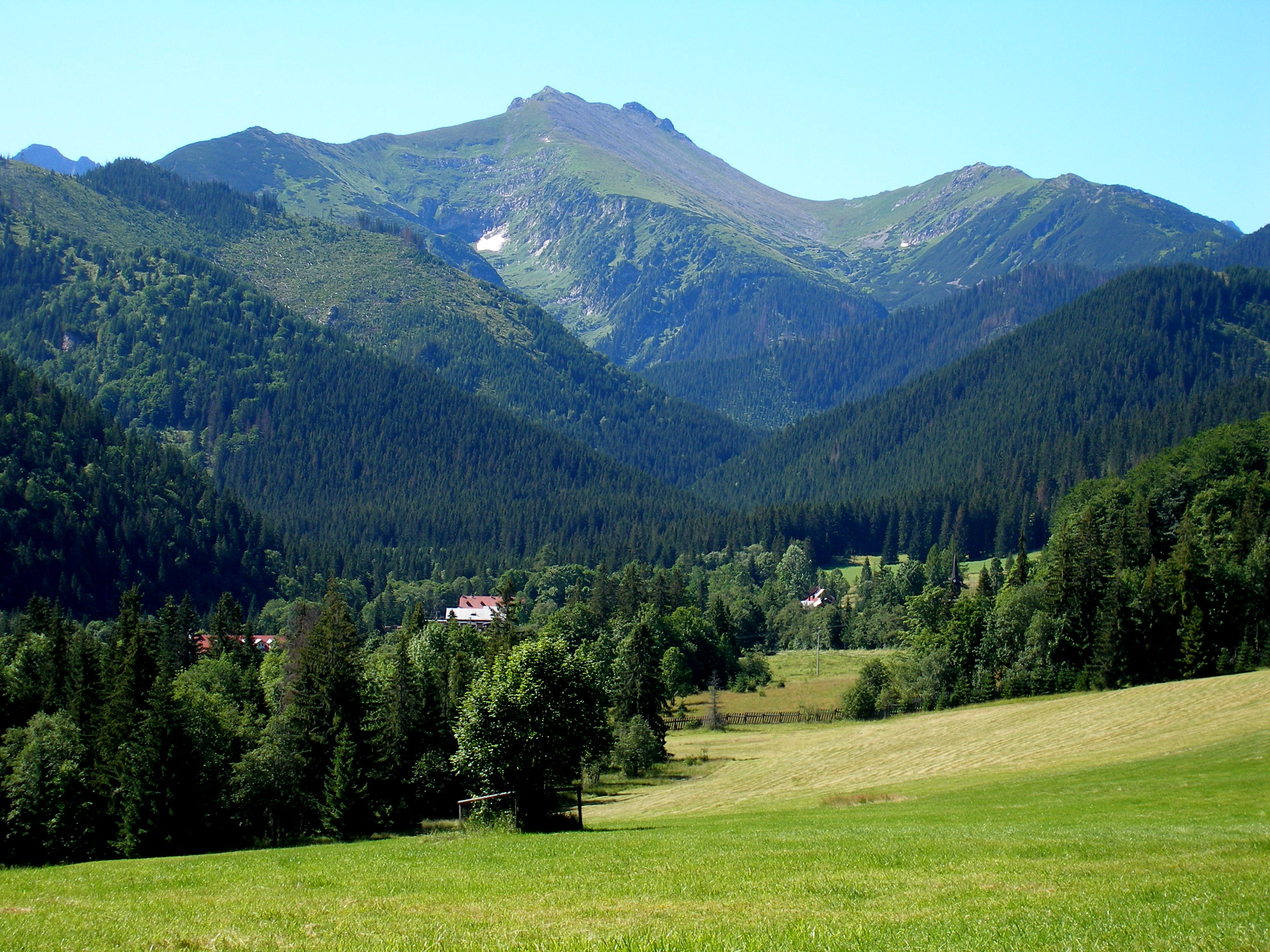 Podtatranská obec Tatranská Javorina.